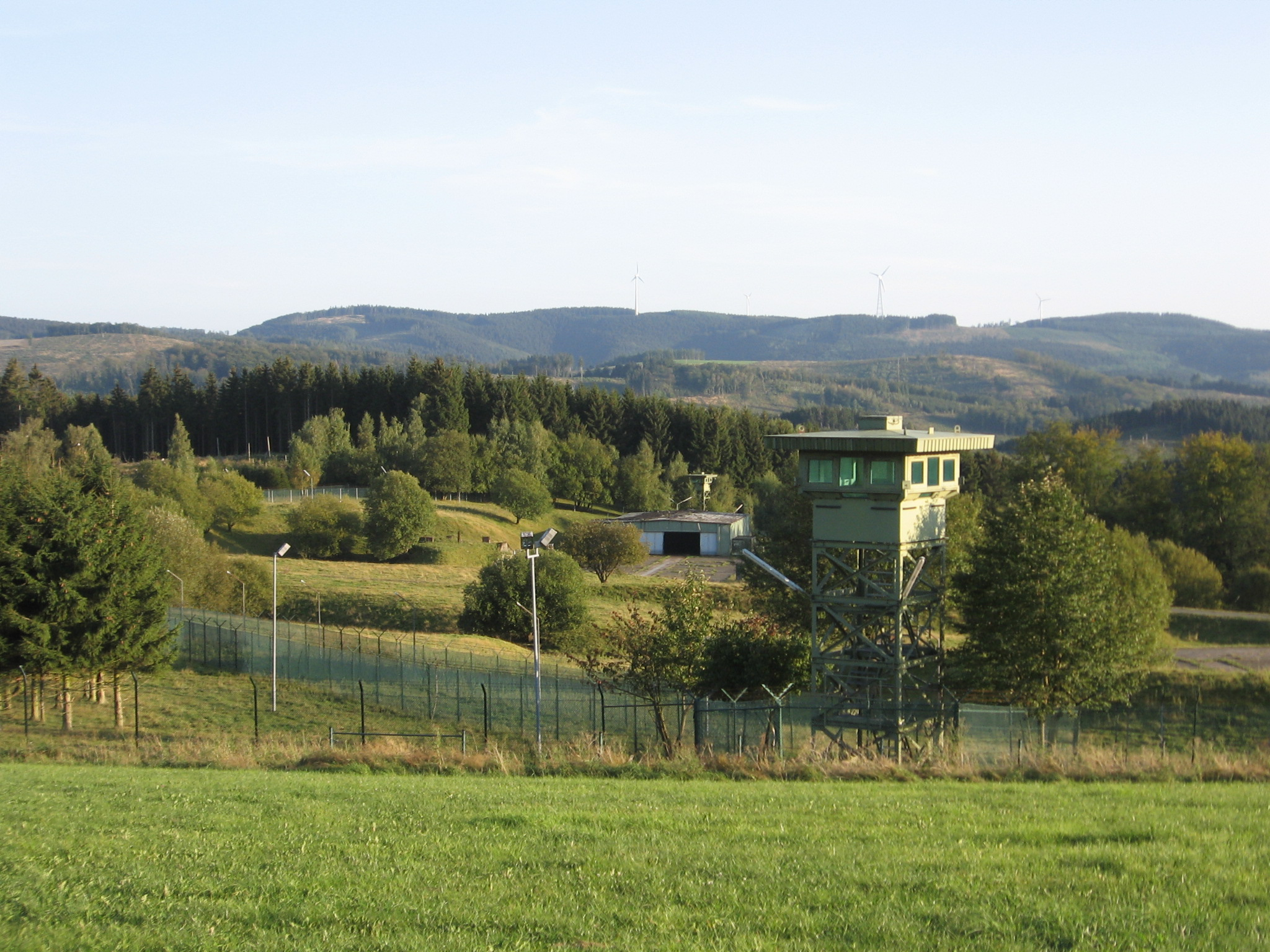 Teilansicht der ehemaligen Nike Hercules Feuerstellung der 1. Batterie des Flugabwehrraketenbataillon 22 bei Lennestadt-Obervalbert. Von 1962 bis 1987 waren hier in drei Raketenhallen mit je drei Startrampen neun einsatzbereite Nike-Raketen gelagert, für die in einem besonders gesicherten Bunker zehn atomare Sprengköpfe bereit gehalten wurden. Im Bild eine der ehemaligen Raketenhallen und zwei der vier Wachtürme. Von 1987 bis 2002 waren auf dem Gelände nicht-nukleare Patriot-Flugabwehrraketen stationiert. Seit 2002 ist das Gelände ungenutzt.